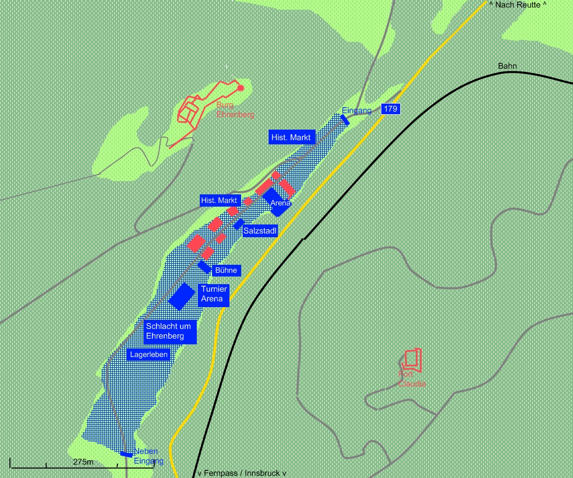 Schematischer Lageplan Gelände dunkelgrün: Waldfläche Gelände hellgrün: Wiesenfläche Gelände blau: Festgelände Gebäude rot: Veranstaltungsfremde Gebäude Gebäude blau: Veranstaltungsorte Linie gelb: B 179 (Fernpassstraße) Linie grau: Wander-/ Fußwege, Gemeindestraßen Linie schwarz: Bahn (Außerfernbahn)